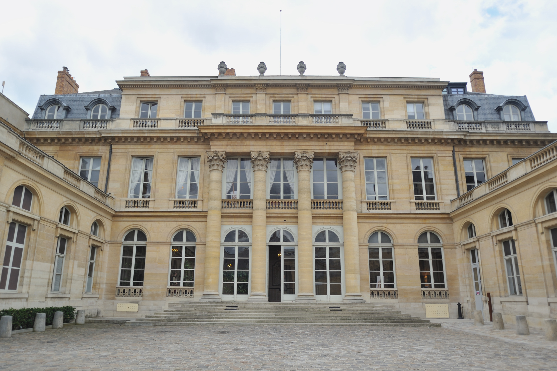 Hôtel du Châtelet (ministère du Travail, de l’Emploi et de la Santé), 127 rue de Grenelle, Paris, France : façade donnant sur la cour d'honneur Photo prise à l'occasion des journées européennes du patrimoine 2011